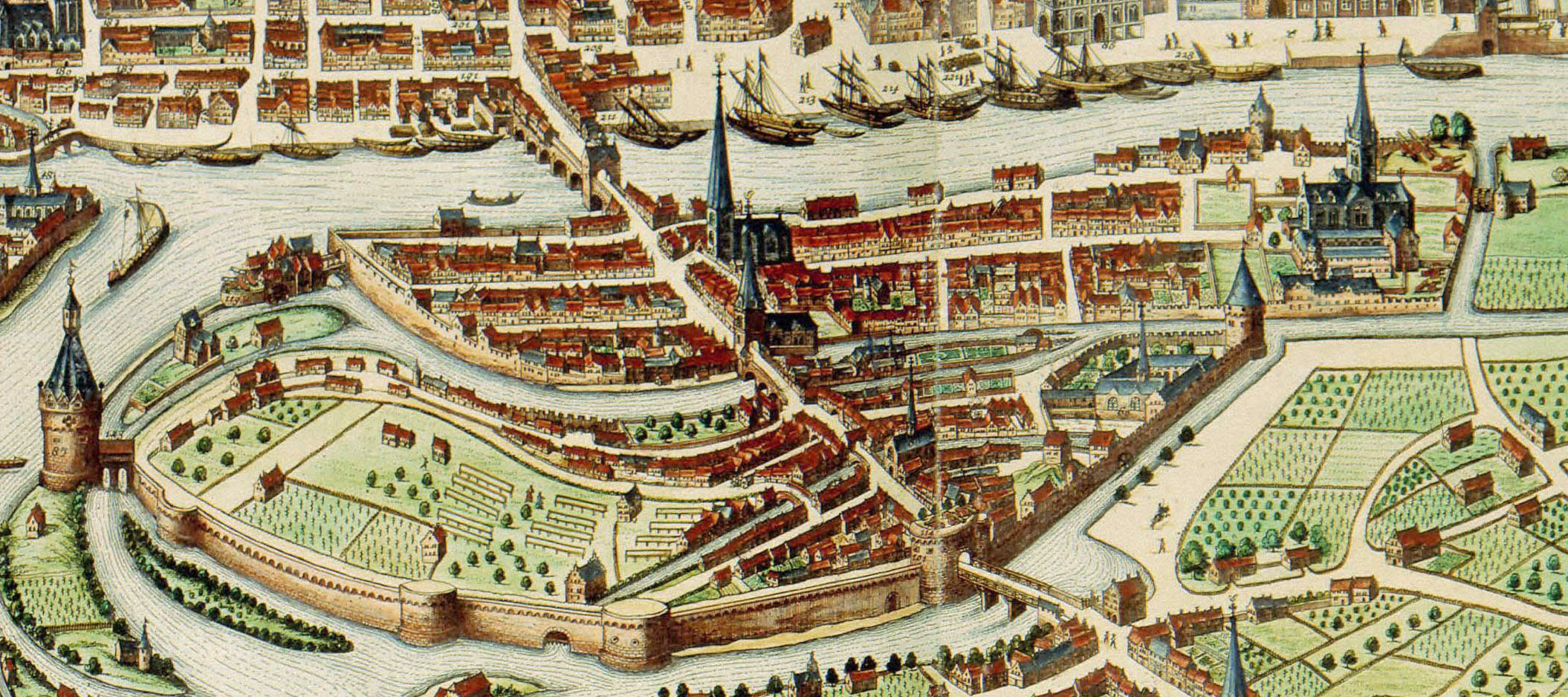 Carte de Liège : extrait quartier d'Outremeuse Saint Pholien et Saint Nicolas